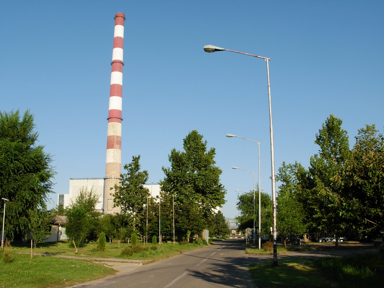 Termoelektrana - toplana (TE TO) u Novom Sadu.